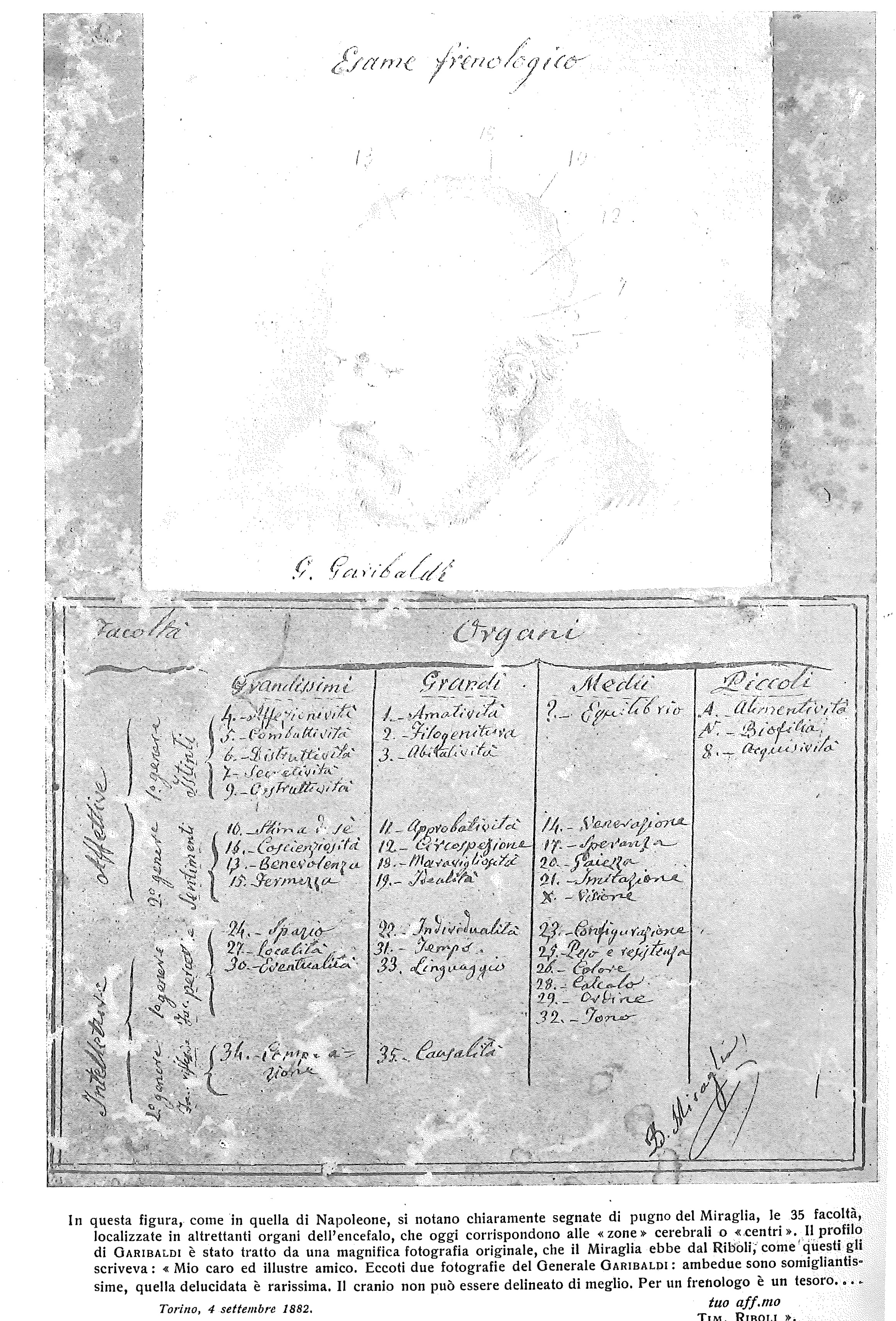 Profilo di Giuseppe Garibaldi con appunti del celebre frenologo italiano Biagio Gioacchino Miraglia relativi alle 35 facoltà localizzate in 35 organi dell'encefalo, che oggi corrispondono alle zone o centri cerebrali